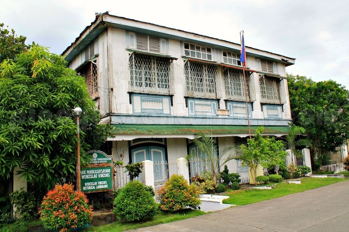 Bikol Central: Luman harong kan mga Vinzons